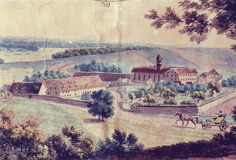 Kloster Habsthal um 1830, Aquarell auf einem Uhrenziffernblatt, Kloster Habstahl, Refektorium